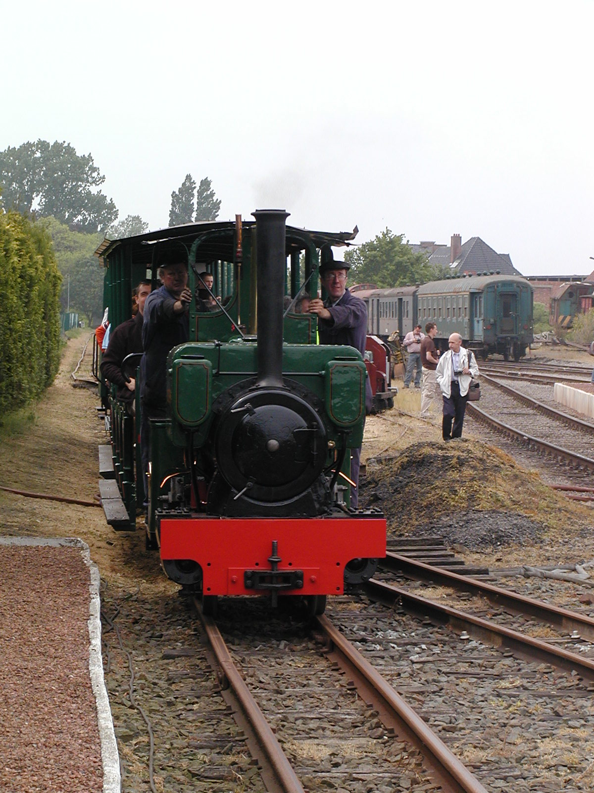 Fotis Yves Nevelsteen dum Vaporfestivalo 2007-06-05